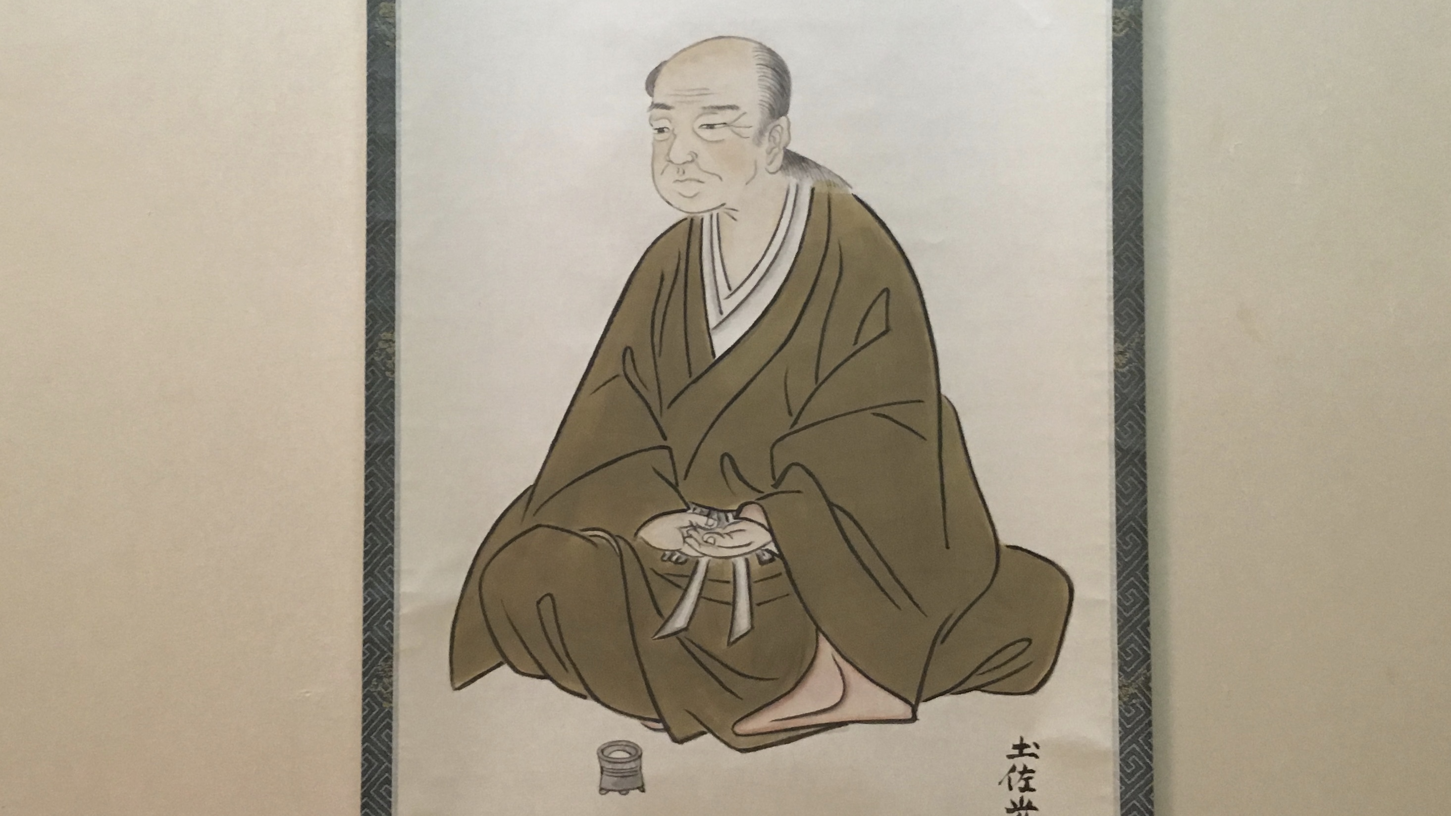 志野流香道 初代 志野宗信